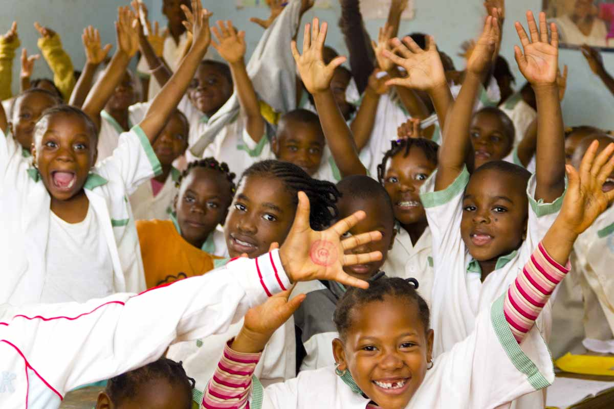 Séance de questions/réponses avec les bambins du Nyanon